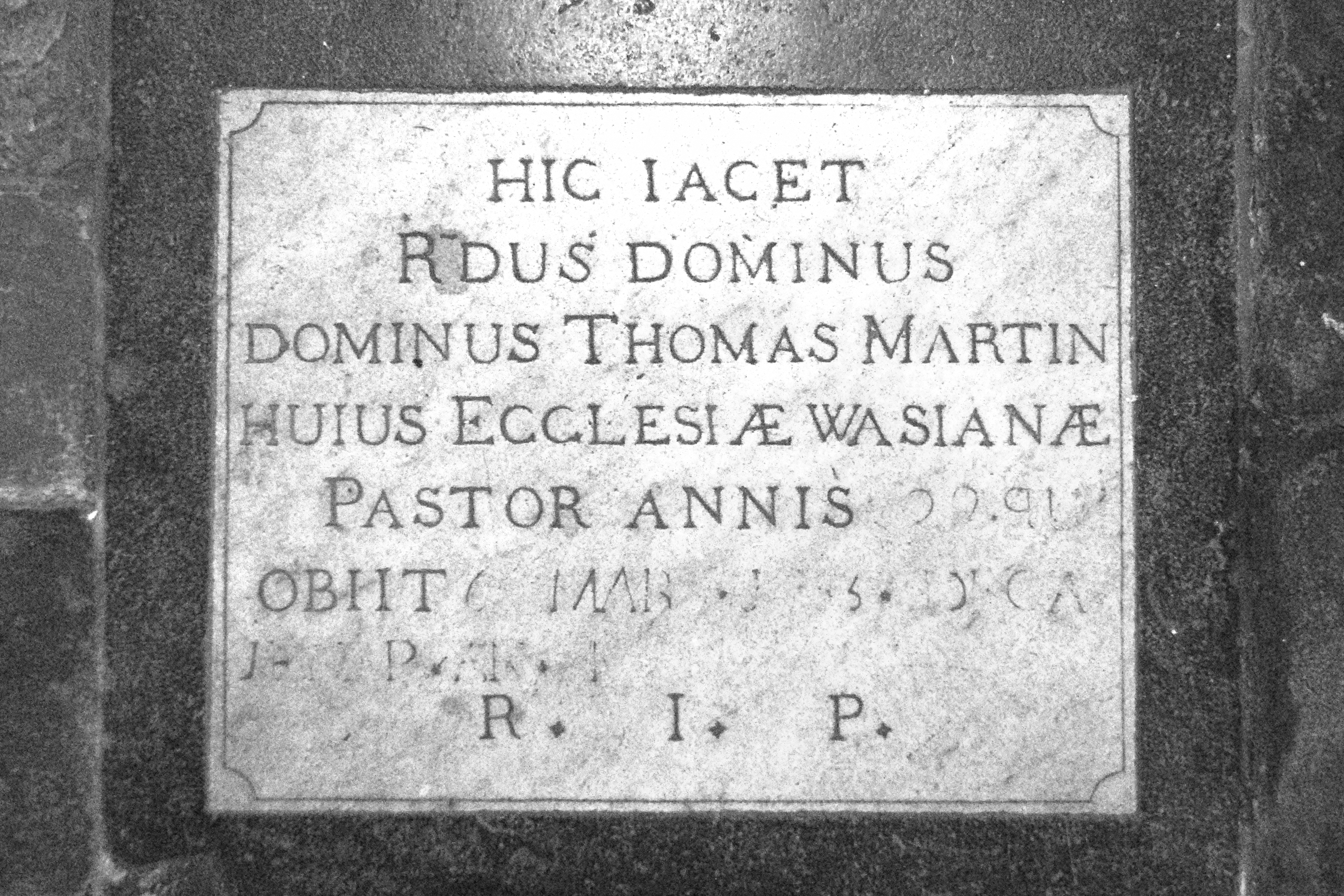 Belgique - Brabant wallon - Église Saint-Martin de Ways